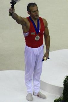 O bulgaro Jordan no pódio das argolas do Mundial de Londres 2009